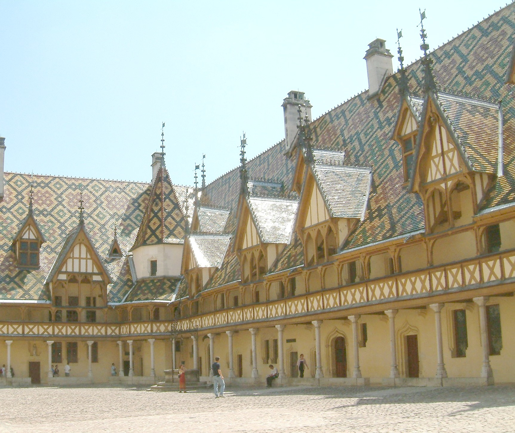 Hospices de Beaune, Bourgogne, France. Vue de la cour intérieure.